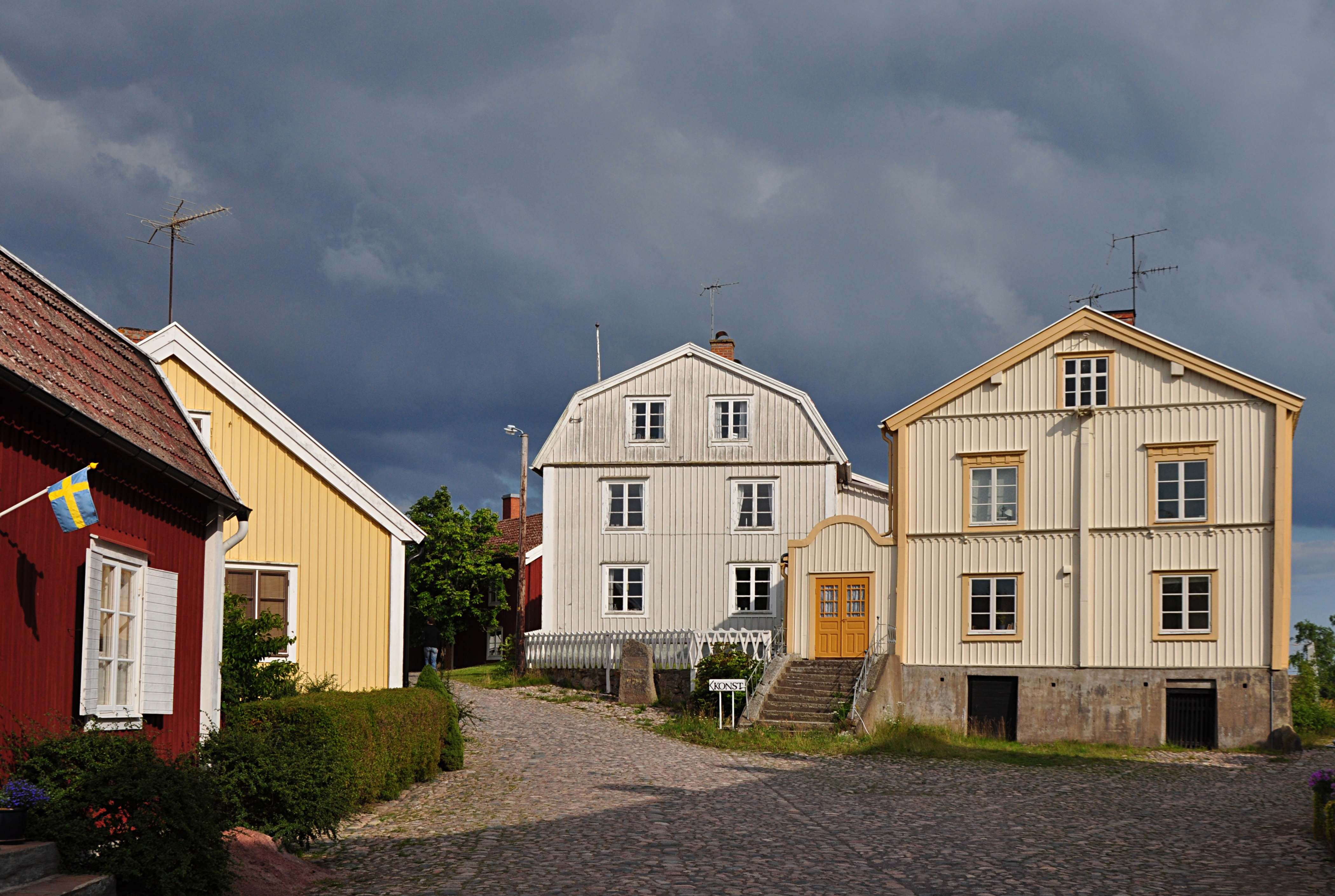 Pataholm är en tidigare municipalköping vid Kalmarsund i Mönsterås kommun.